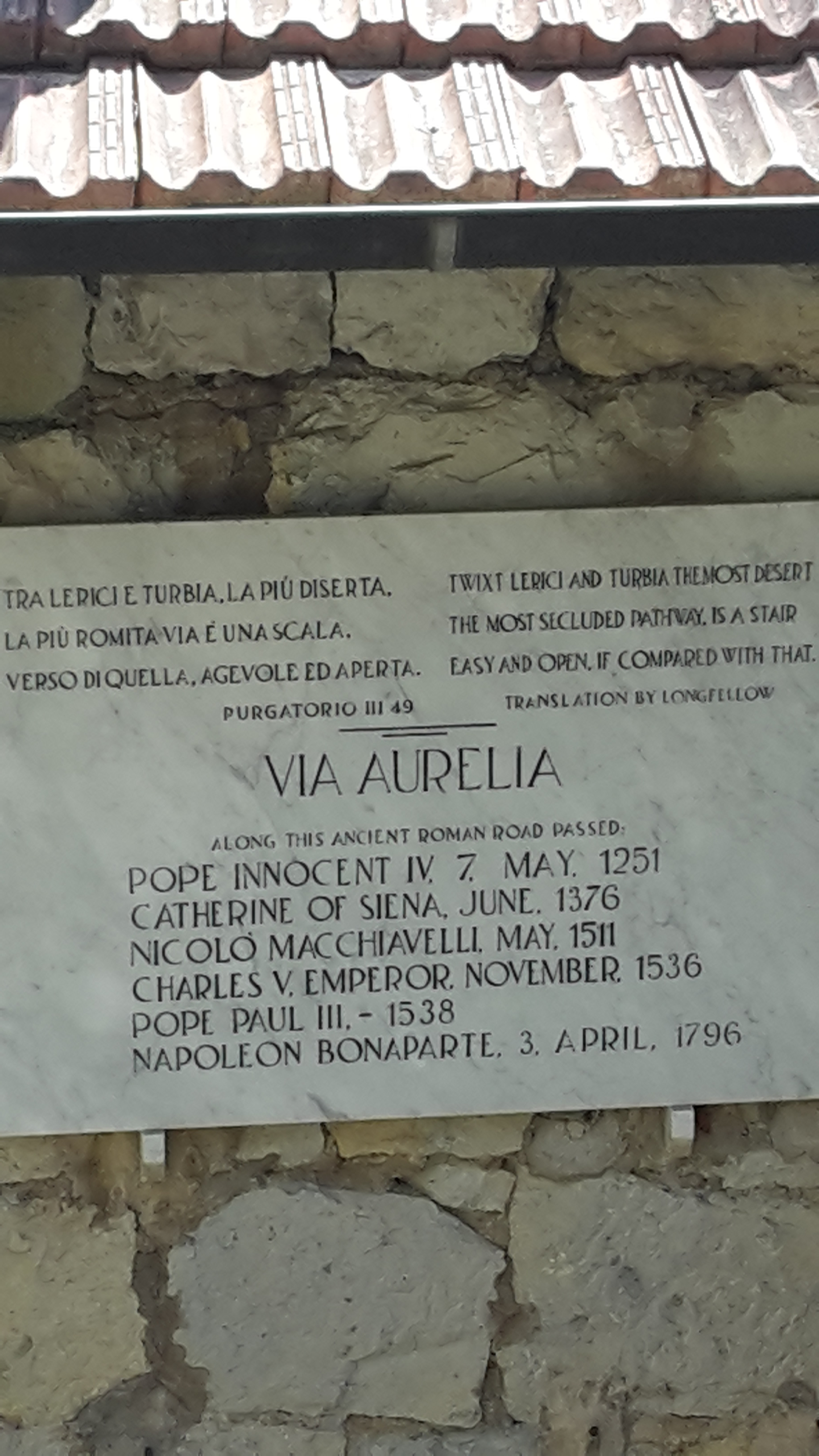 Placca afffissa lungo il vecchio tracciato della via Aurelia, attraversante Villa Hanbury alla Mortola.